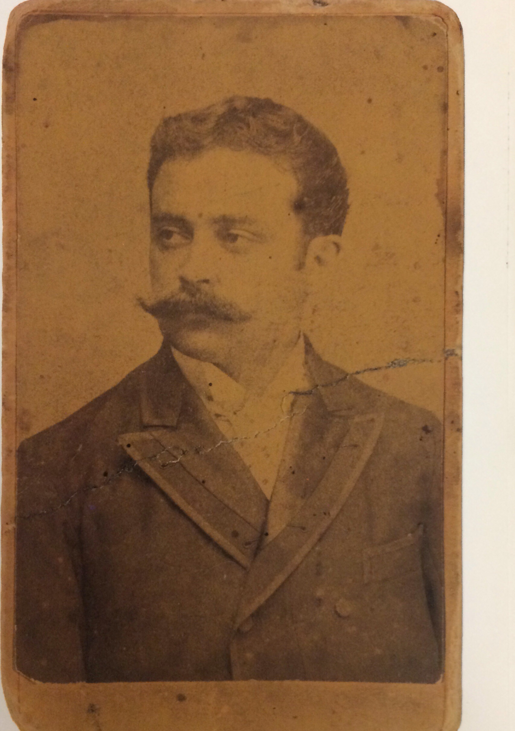 Próspero Rey, hijo. Fotografía de su propio estudio. Participó en 1895 en la gran exposición fotográfica de Atlanta, donde obtuvo medalla. Al igual que su padre, se dedicó a la fotografía.